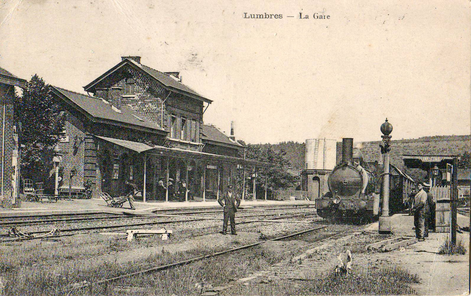 Carte postale ancienne éditée par Constant LUMBRES - La Gare